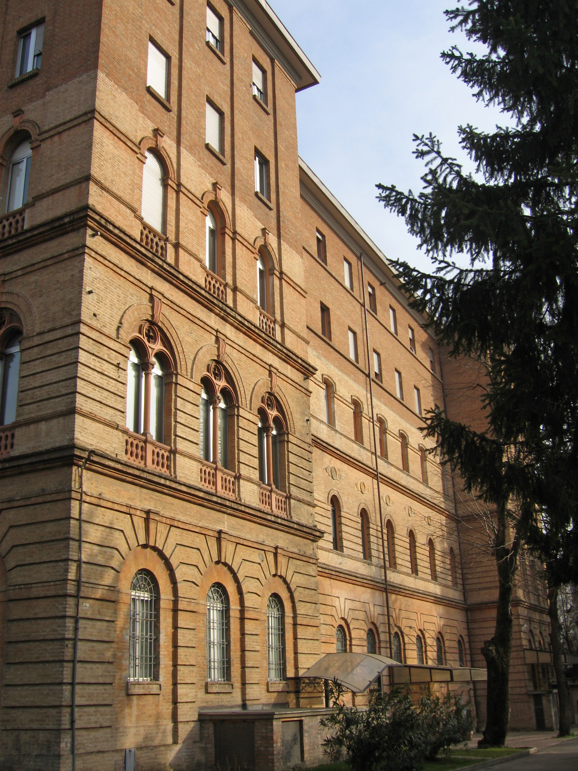 Casa Madre dei Missionari Saveriani - ala ovest